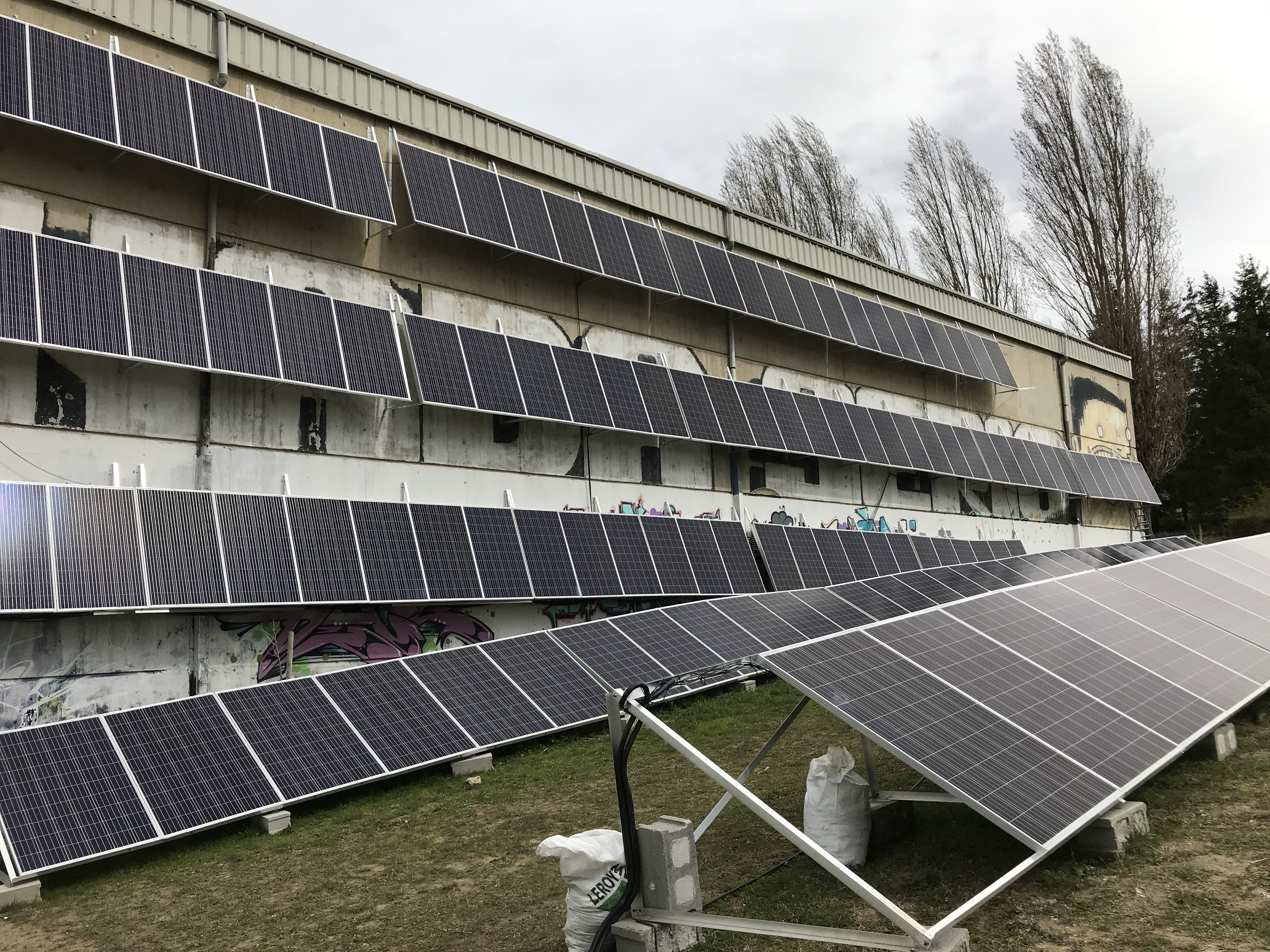 Instalación de paneles solares en el barrio de Errekaleor en Vitoria-Gasteiz (Araba) País Vasco España.